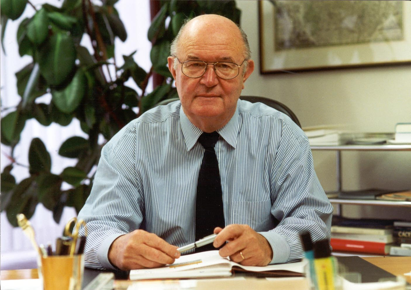 Portrait Arno Krause